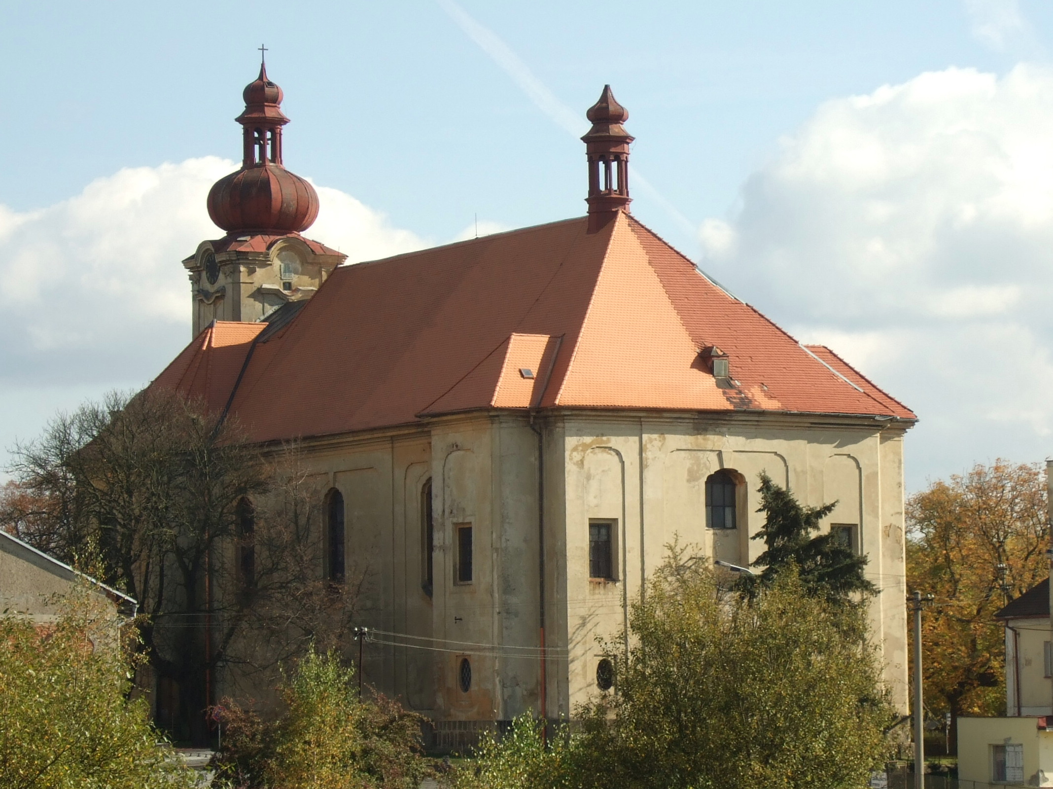 Kostel sv. Anny v Sedlci (Karlovy Vary)